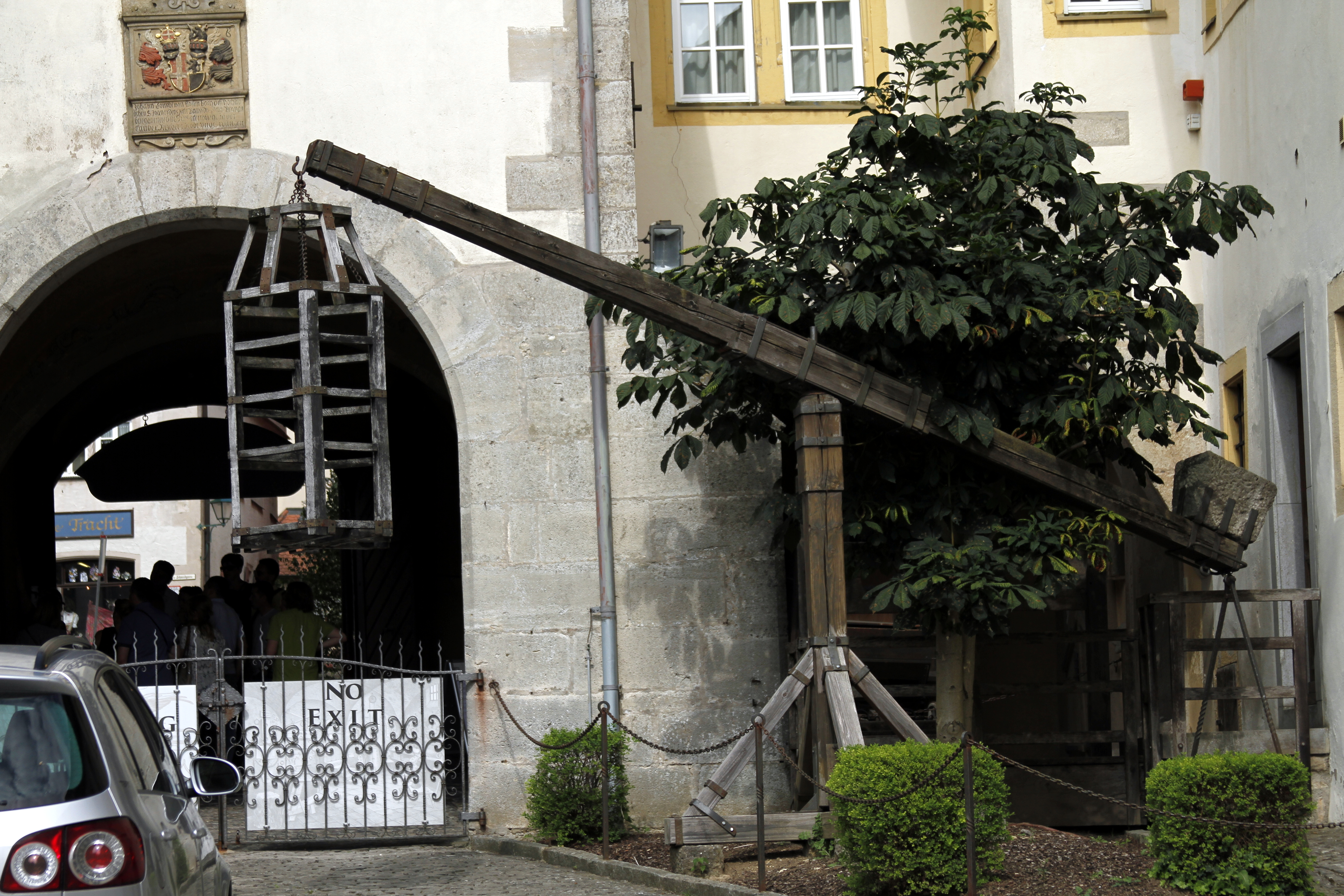 Mittelalterliches Kriminalmuseum - Rothenburg ob der Tauber - German